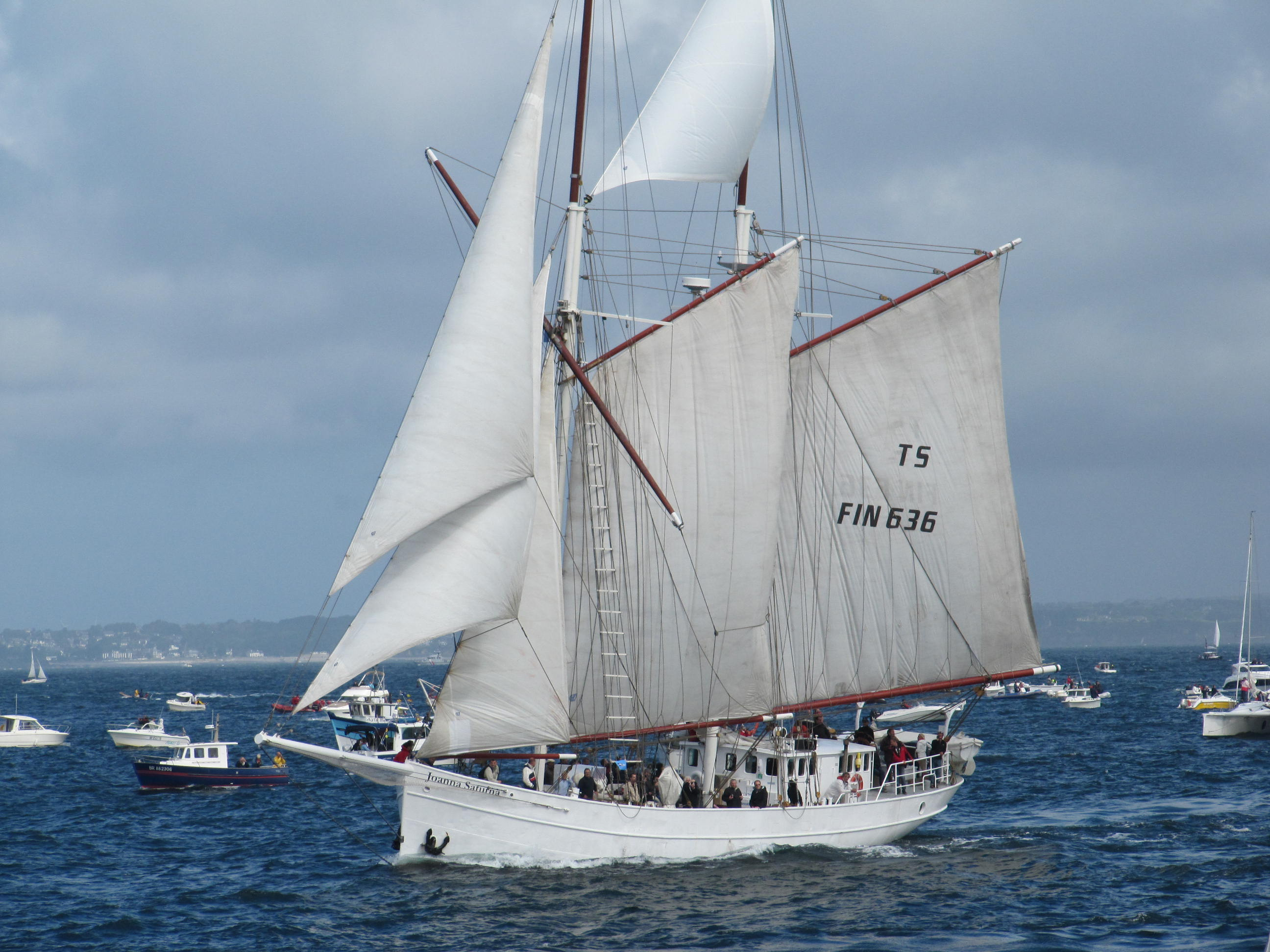 Johanna Saturna